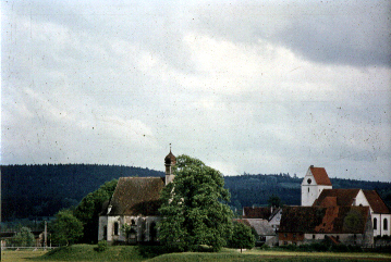 Panorama Wilburgstetten